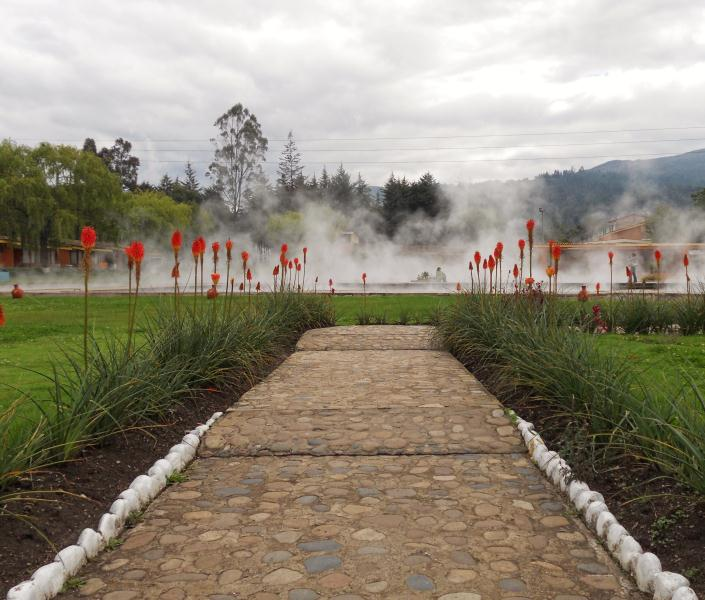 Los Baños del Inca 2012